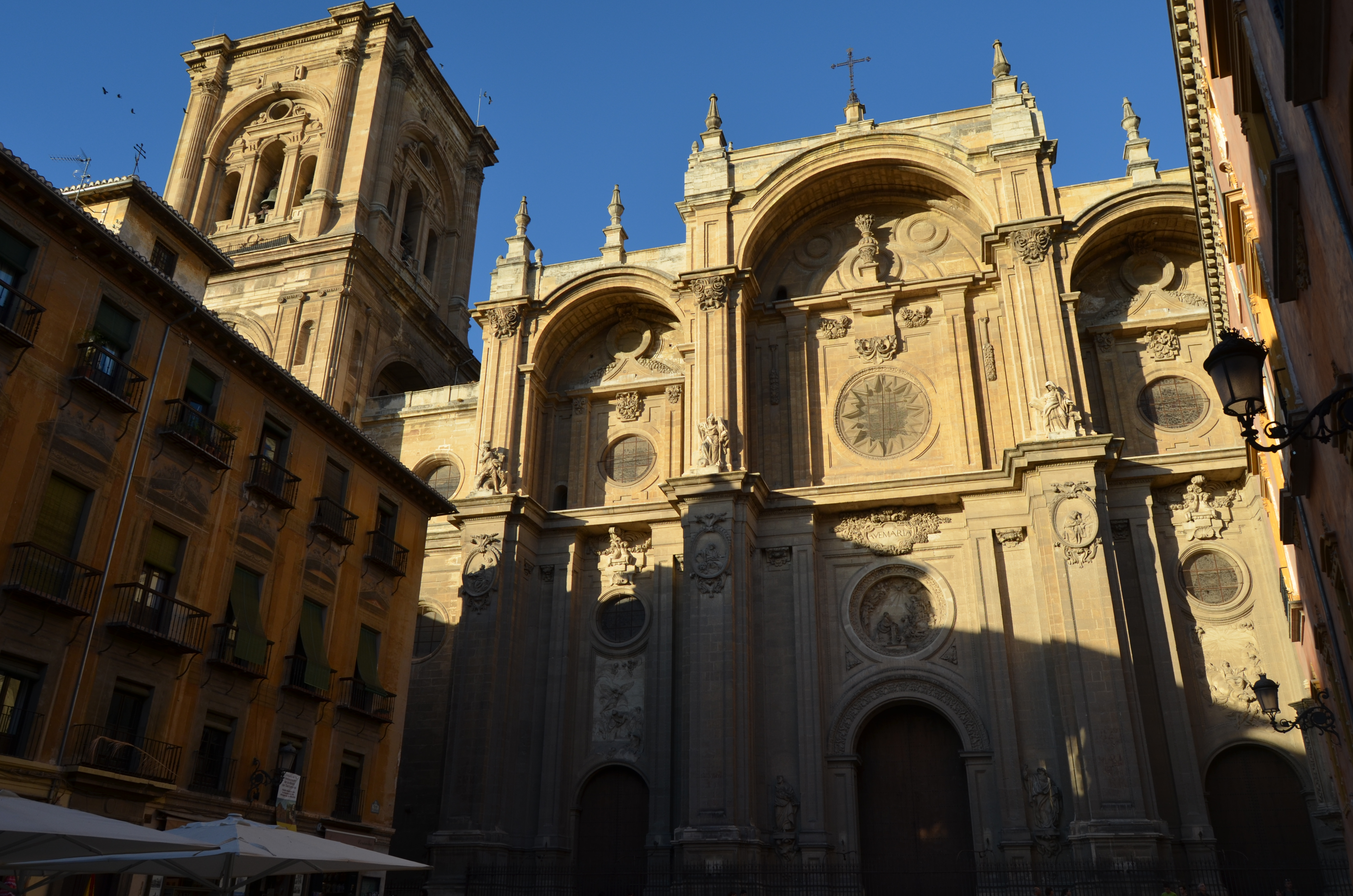 Catedral de Granada. RI-51-0000339